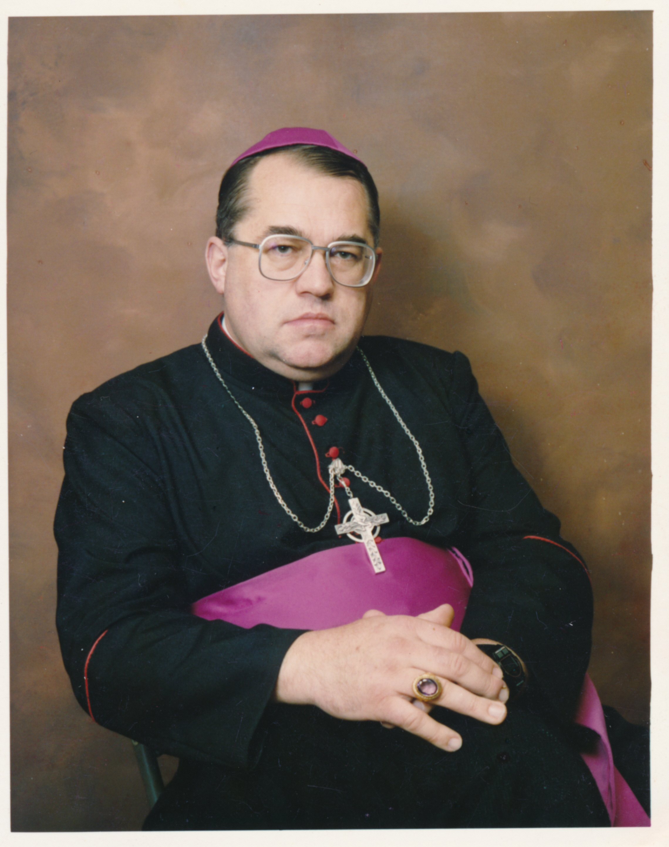 Biskup Oliver Oravec